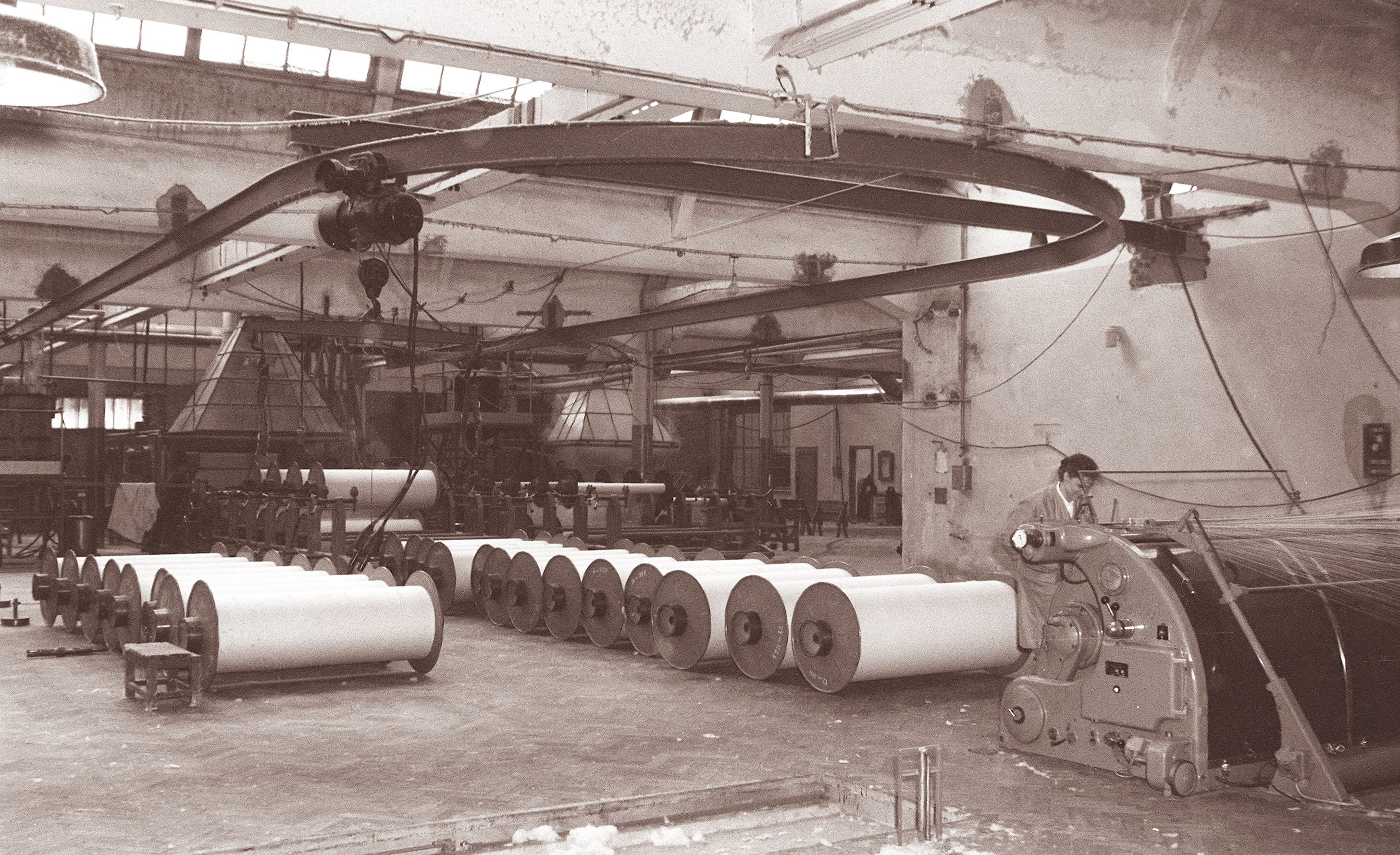 Mariborska tekstilna tovarna